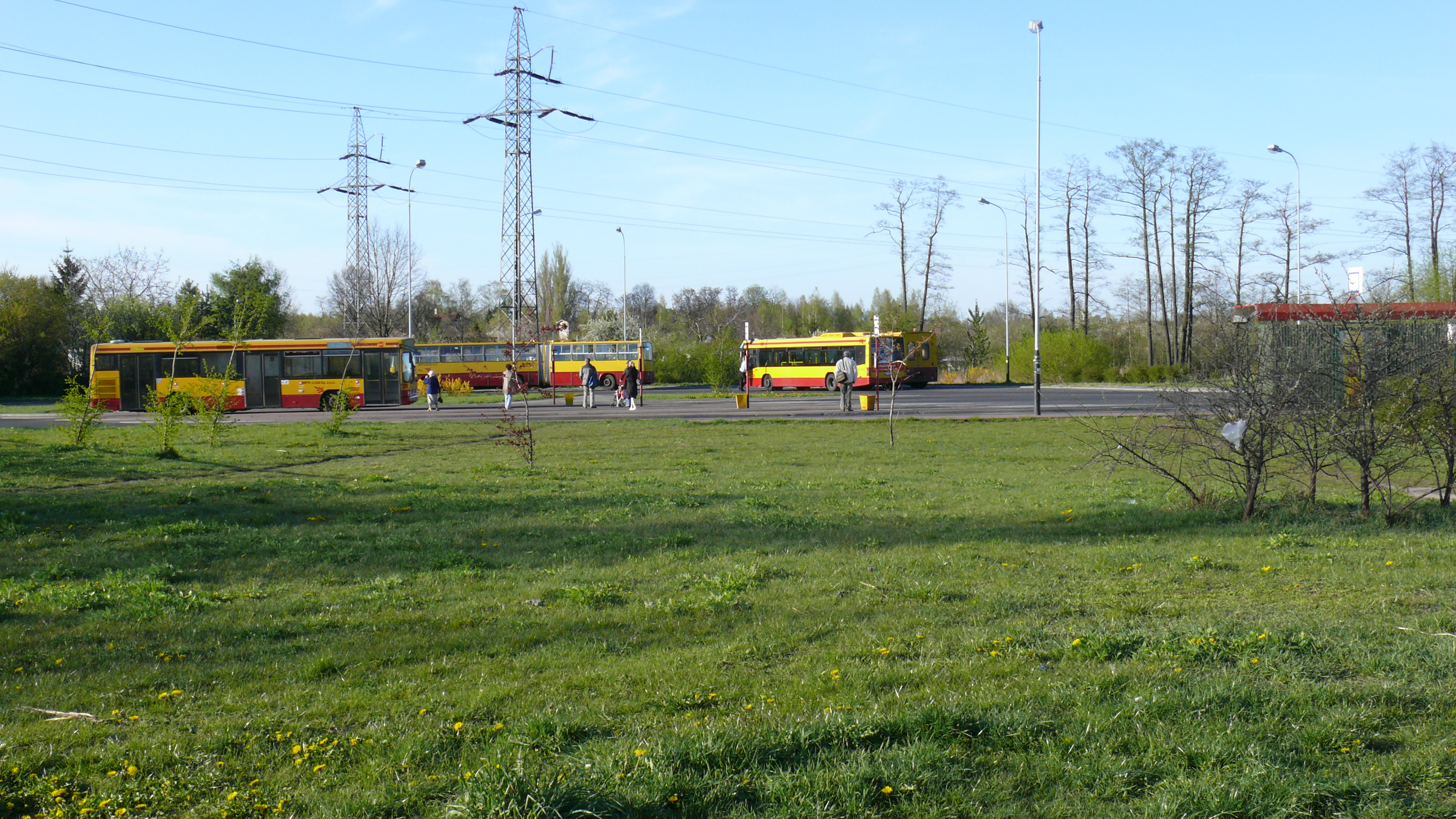 Krańcówka autobusowa "Świtezianki" w Łodzi.